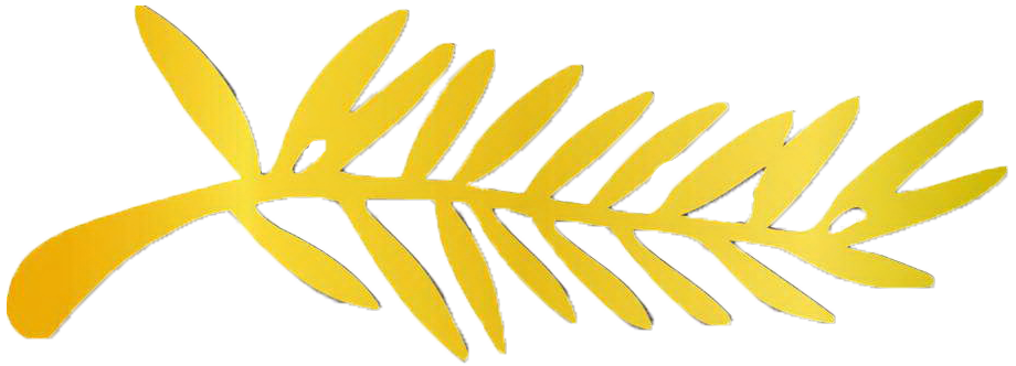 Palme d'Or